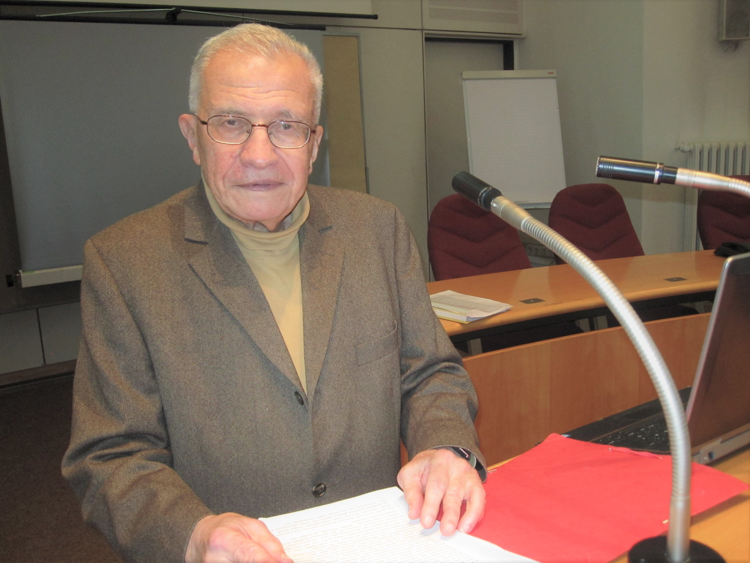 Wolfgang Küttler beim Vortrag (Berlin, 2019)